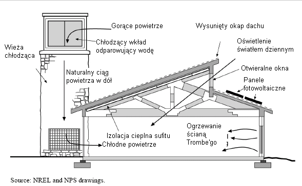 Przykład chłodzenia i ogrzewania pasywnego w istniejącym budynku Zion National Park